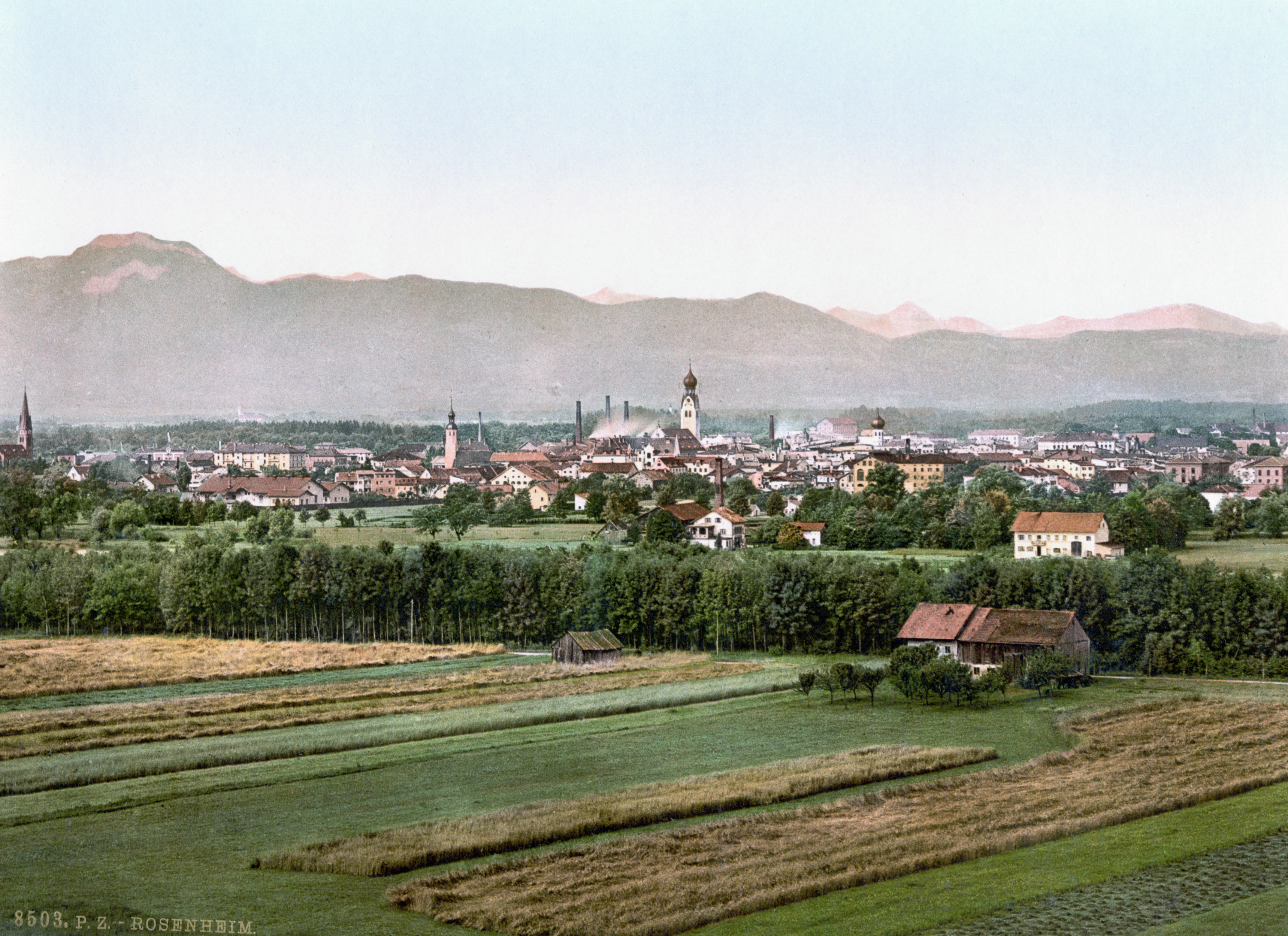 Rosenberg